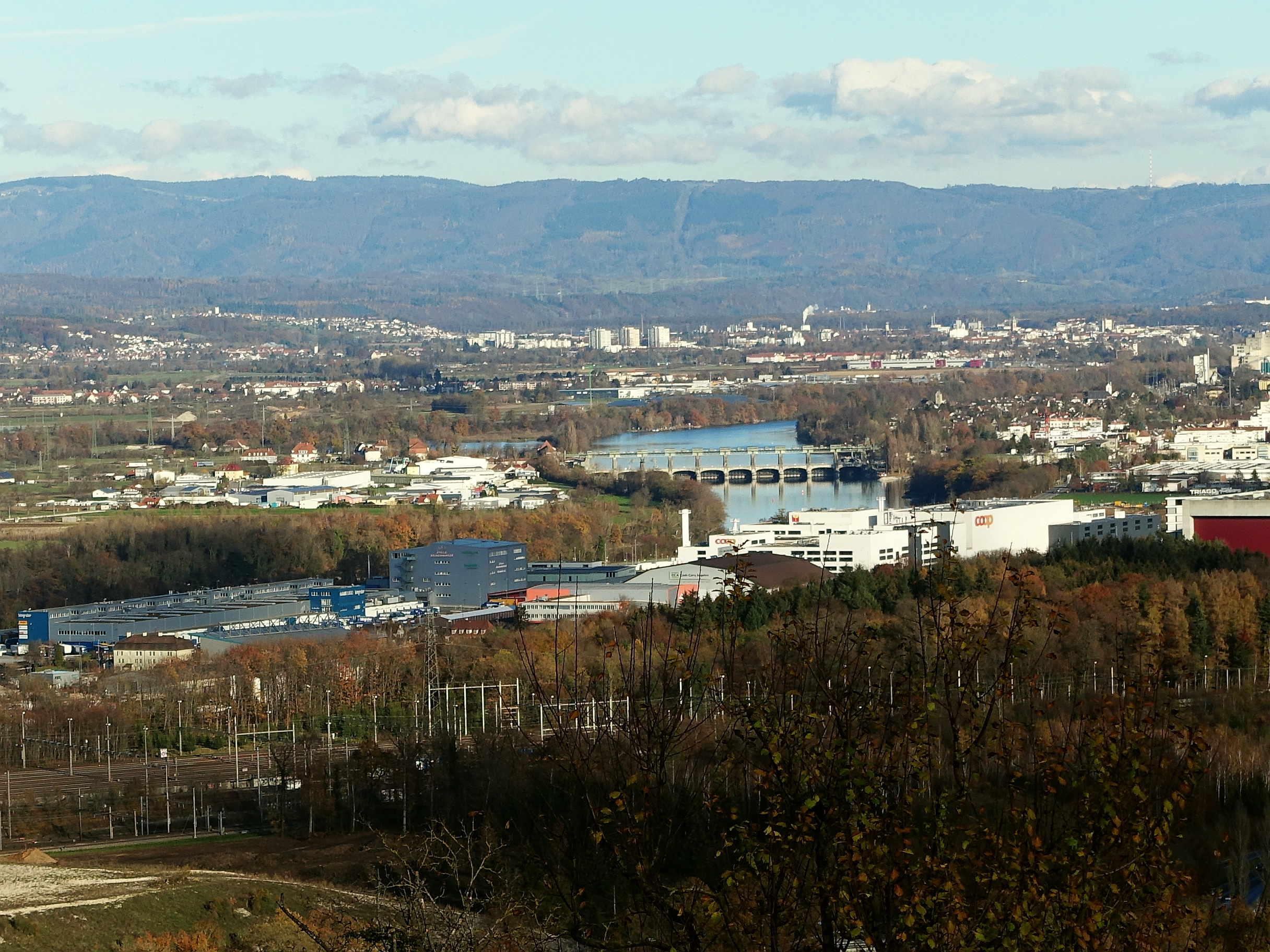 Staustufe Augst-Wyhlen. Stauwehr, Kraftwerk Wyhlen, Unterwerk Wyhlen. Panorama Blick von der vorderen Wartenberg Ruine in Muttenz zur Staustufe Augst-Wyhlen